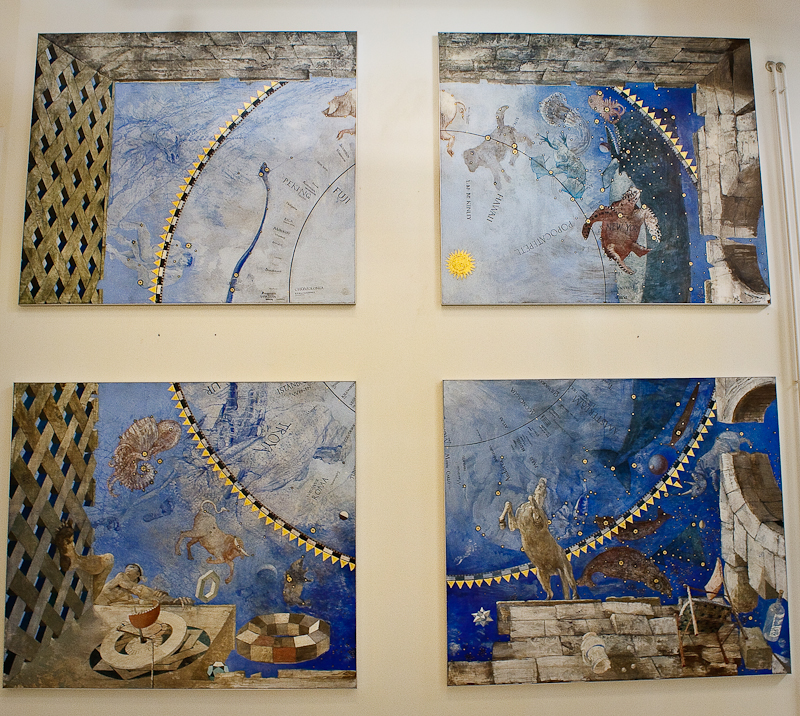 Matthijs Röling De Sterrenhemel uit Café De Eenhoorn 1989 olieverf op paneel De Sterrenhemel uit Café De Eenhoorn Matthijs Röling The Starry Sky in Café De Eenhoorn 1989 oil on panel The Starry Sky in Café De Eenhoorn